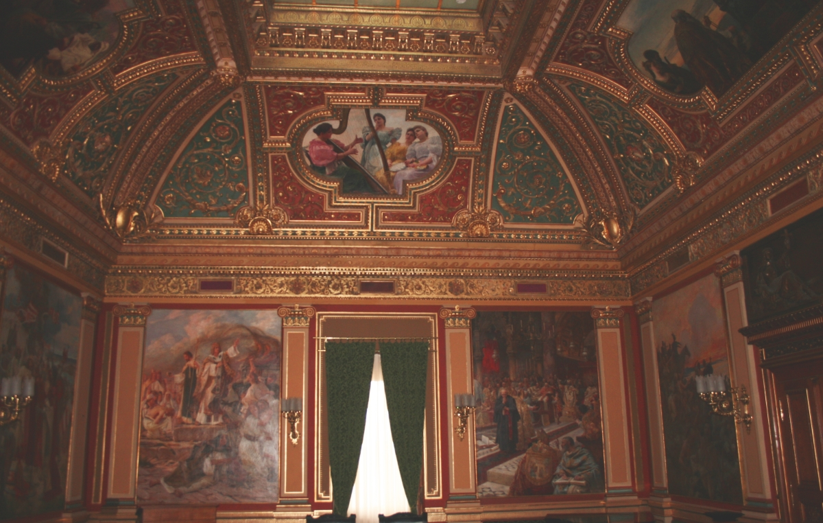 Zlatna dvorana Hrvatskog instituta za povijest, Zagreb